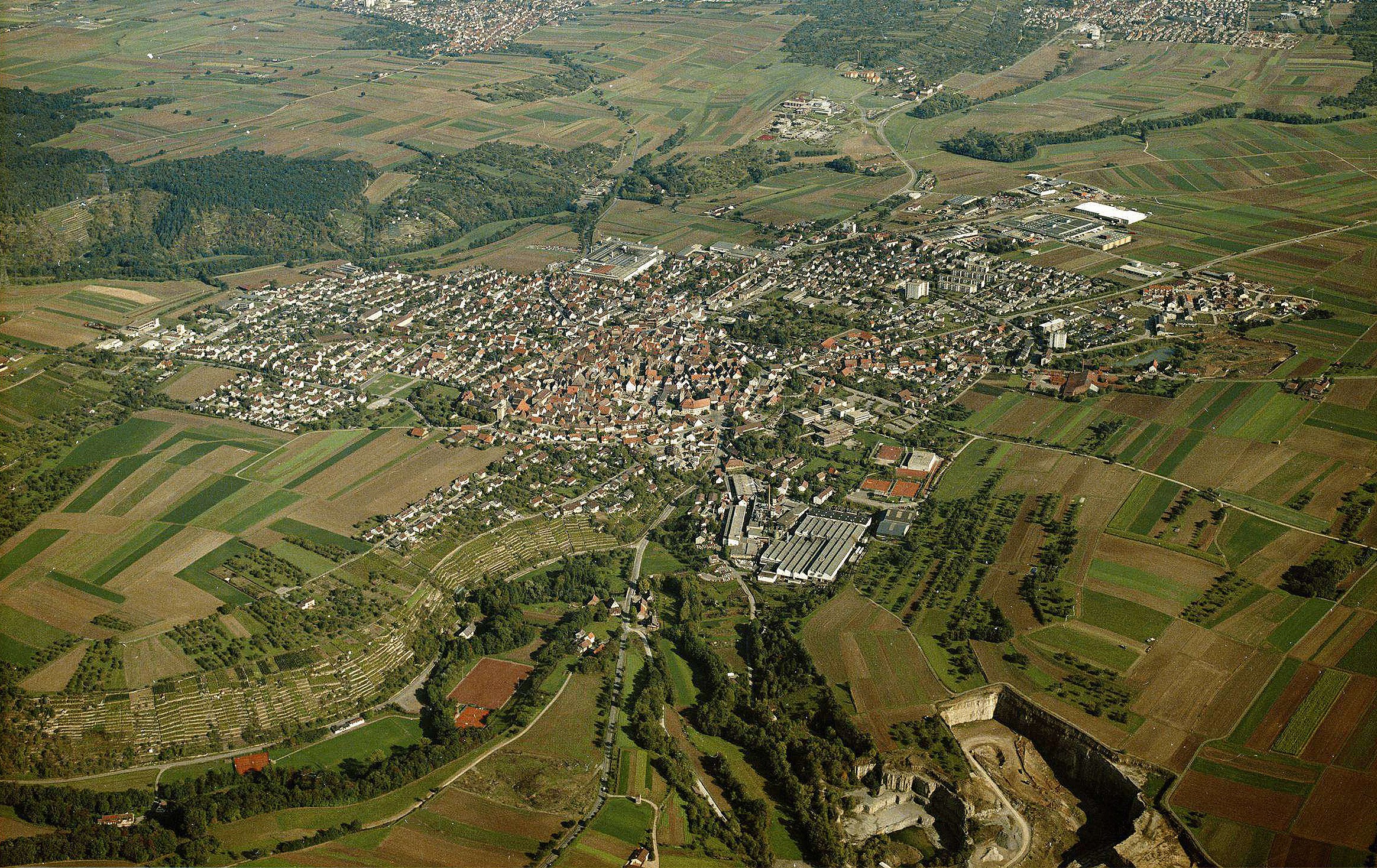 Markgröningen 1983: Luftbild von Westsüdwest